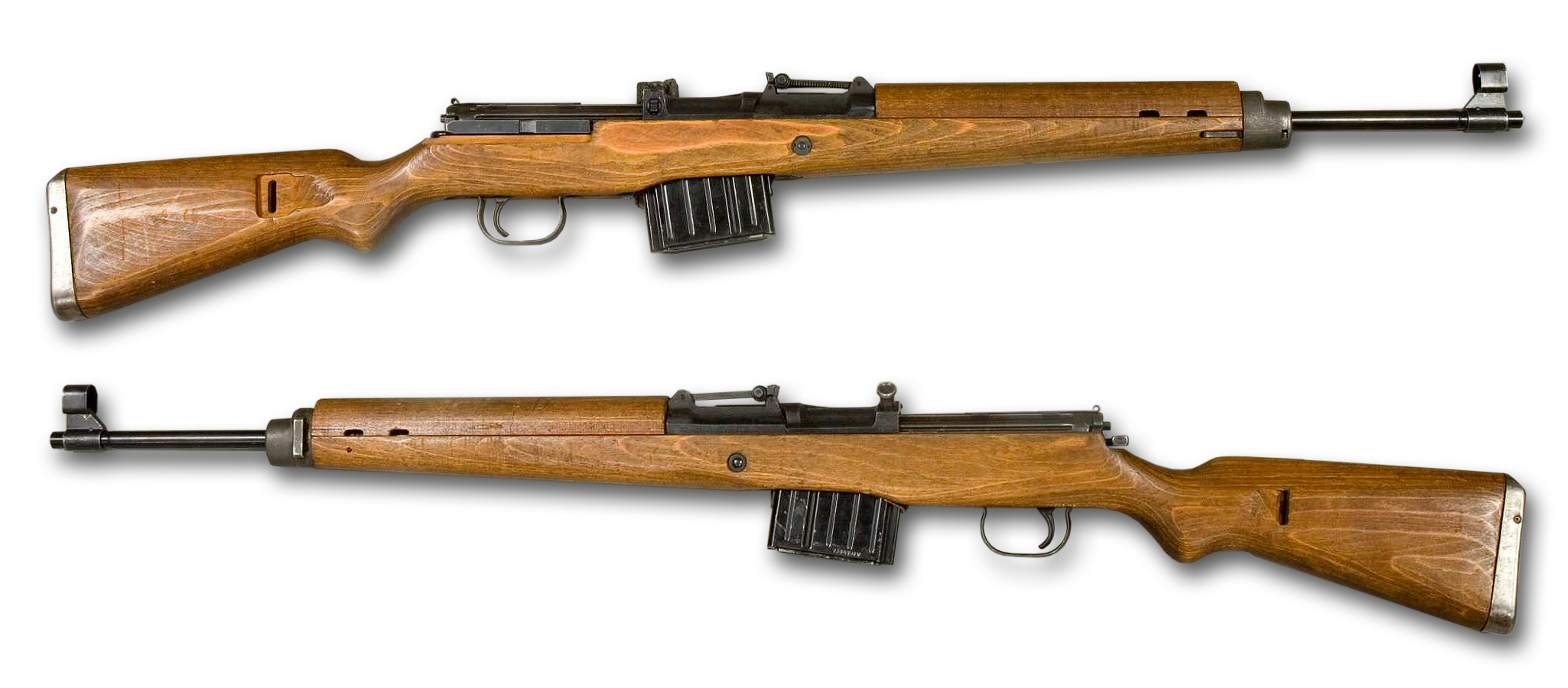 Neue Version des Bildes "Automatgevär m1943 - Tyskland - AM.045876.jpg" mit neutralem (weißen) Hintergrund, entferntem Archiv-Sticker und technischem Schatten.